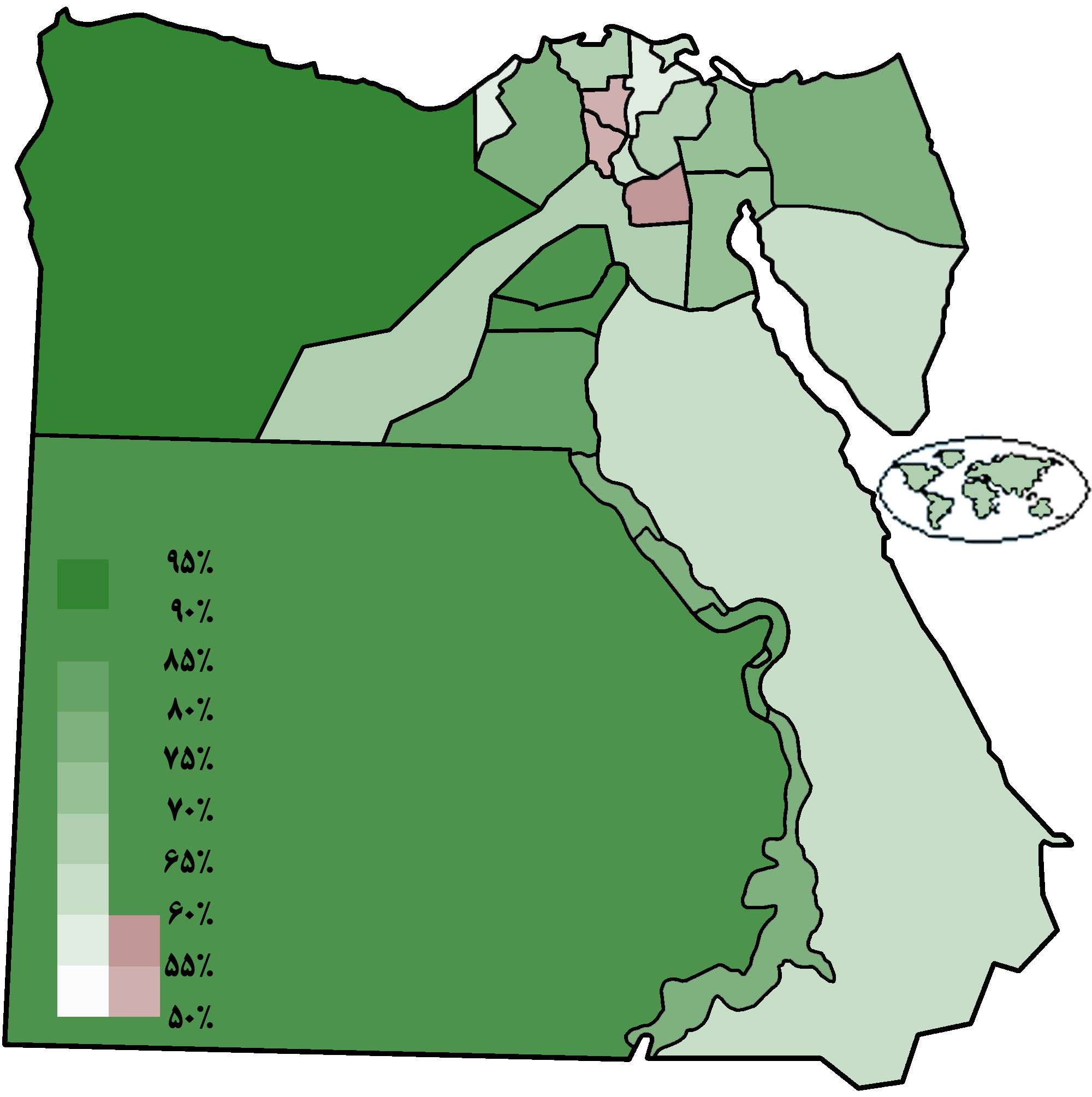 نتایج همه‌پرسی قانون‌اساسی مصر (۲۰۱۲) به تفکیک استان